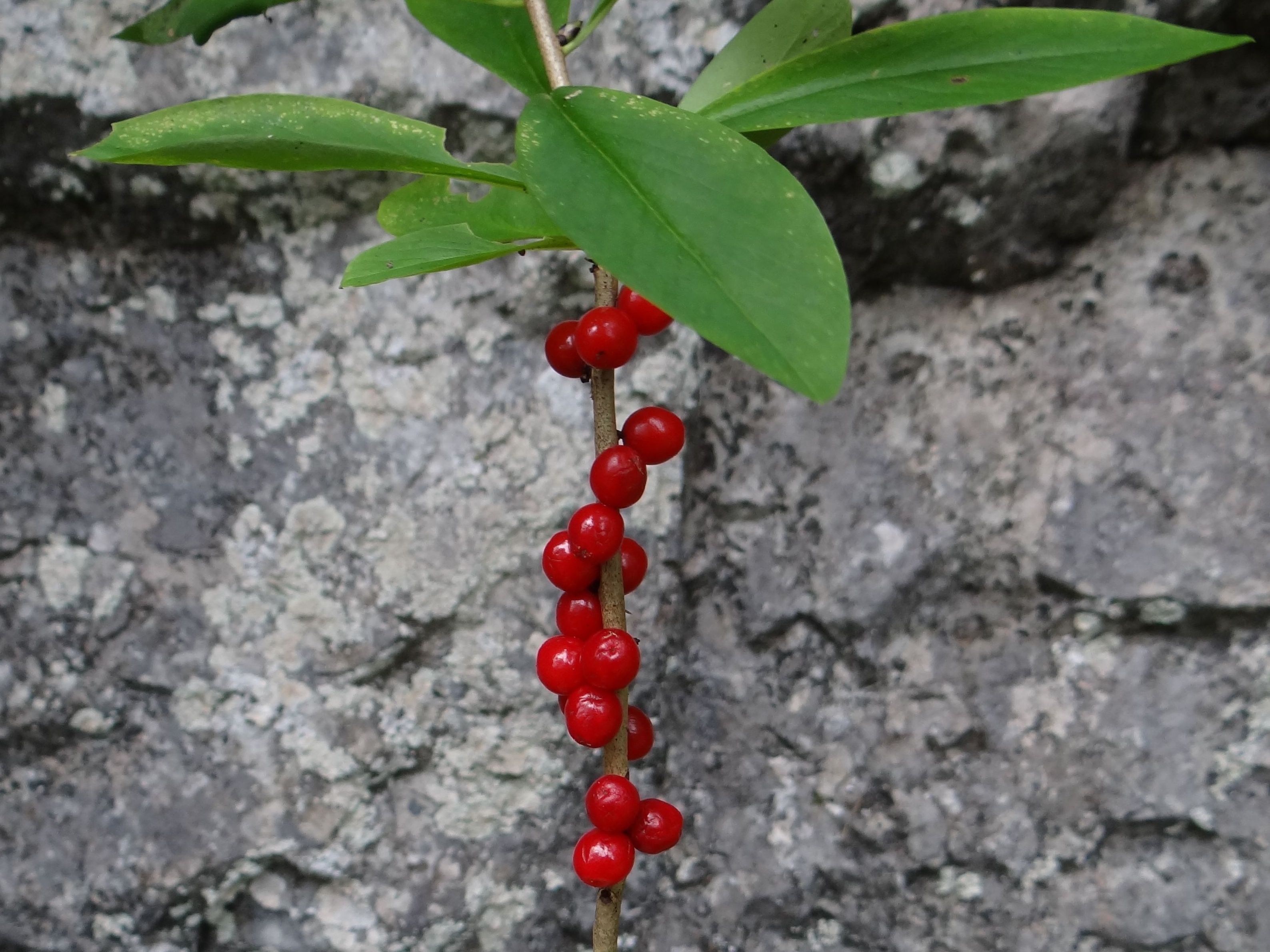 Daphne mezereum (habitat:Słowacki Raj)